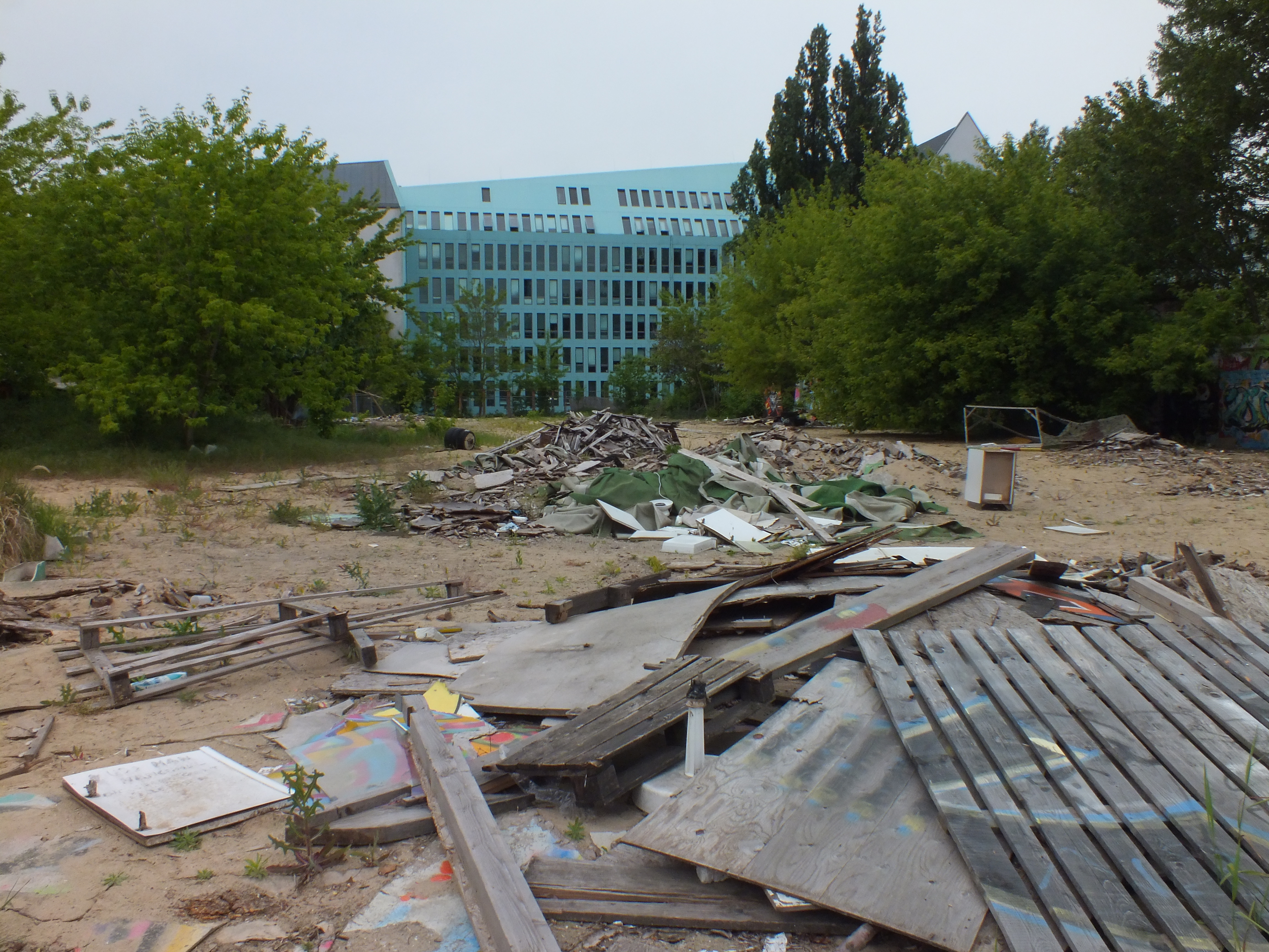 zukünftiger Park an der Spree/Spreepark zwischen Schillingbrücke und Eastside-Park